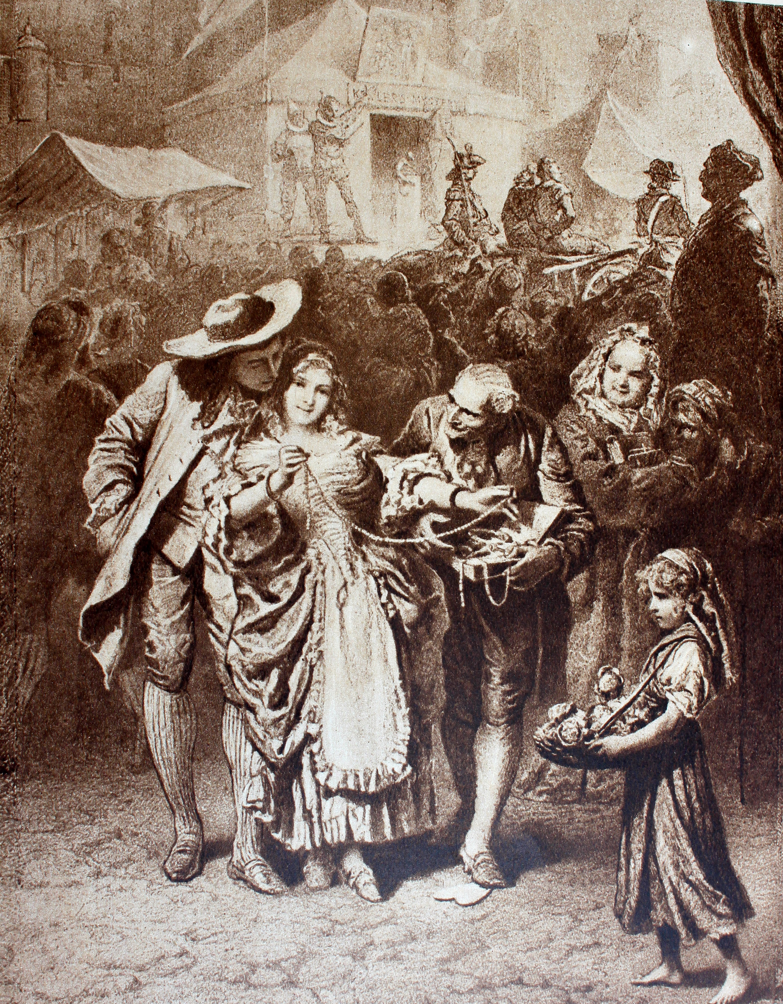 "La tragédie de l`homme", de Imre Madách, illustrée par Mihály Zichy